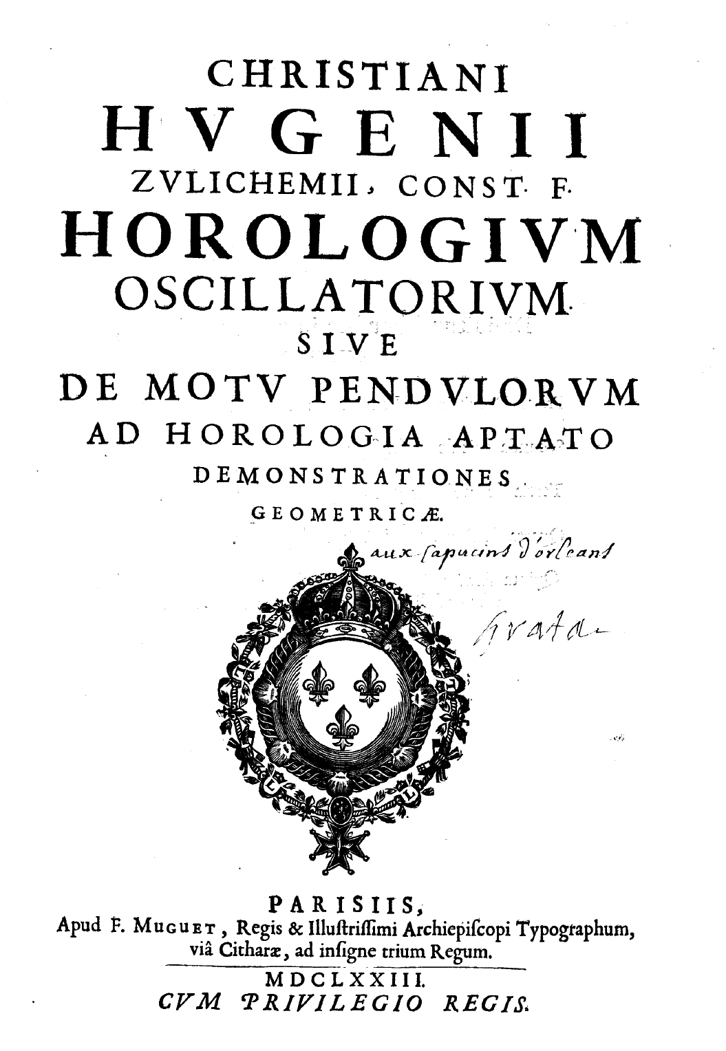 Christiani Hugenii Zulichemii, Const. f. Horologium oscillatorium, siue De motu pendulorum ad horologia aptato demonstrationes geometricae. - Parisiis : apud F. Muguet, regis & illustrissimi archiepiscopi typographum, viâ Citharæ, ad insigne trium Regum, 1673. - [14], 161, [1] p. : ill. ; fol. .